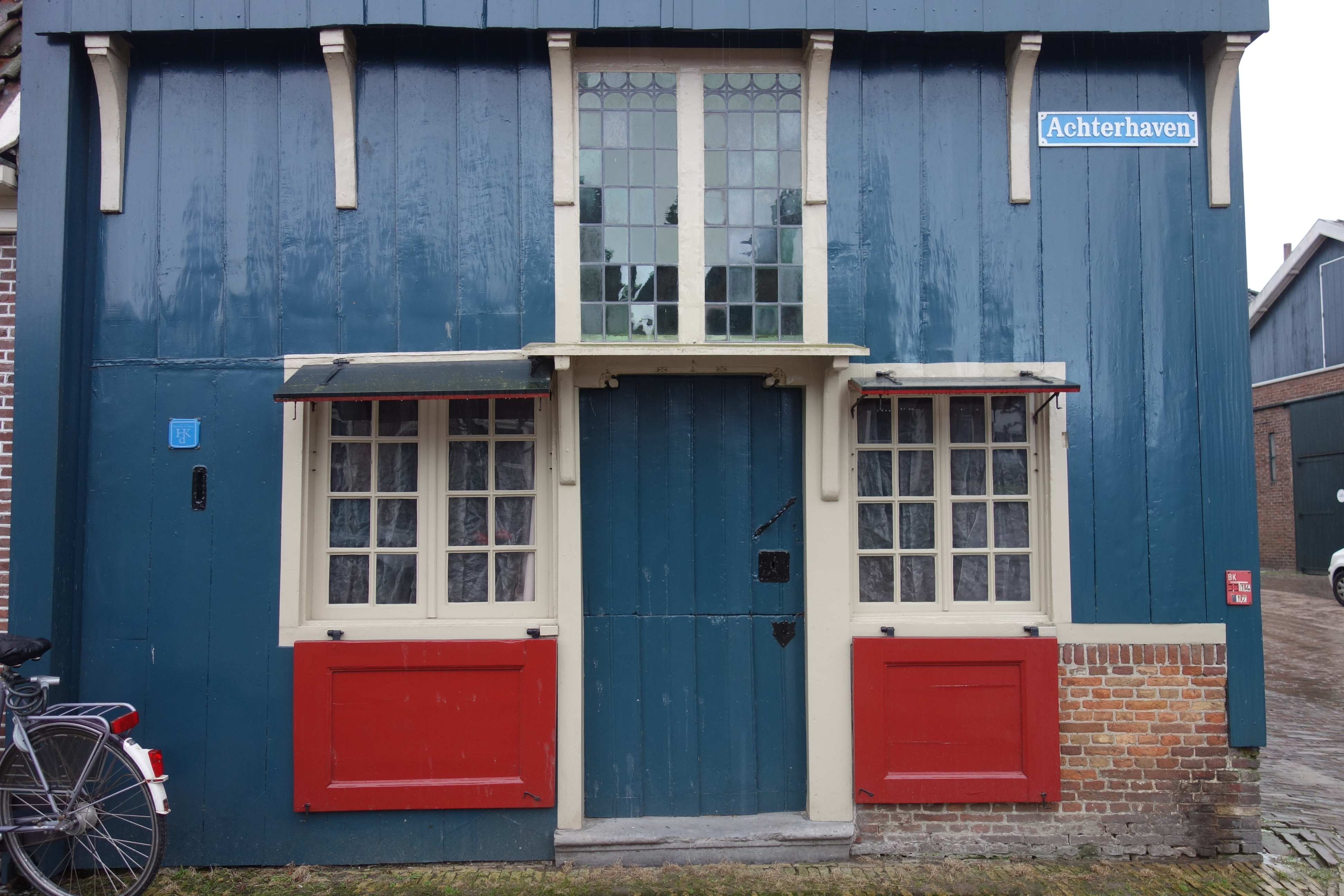 Achterhaven 105 in Edam is vrijwel geheel van hout gebouwd. Pand is eigendom van Vereniging Hendrick de Keyser. De houten pui is nog voorzien van het originele gotische deurkalf. Bovenin zijn de korbelen te zien van de overkragende zolderverdieping.